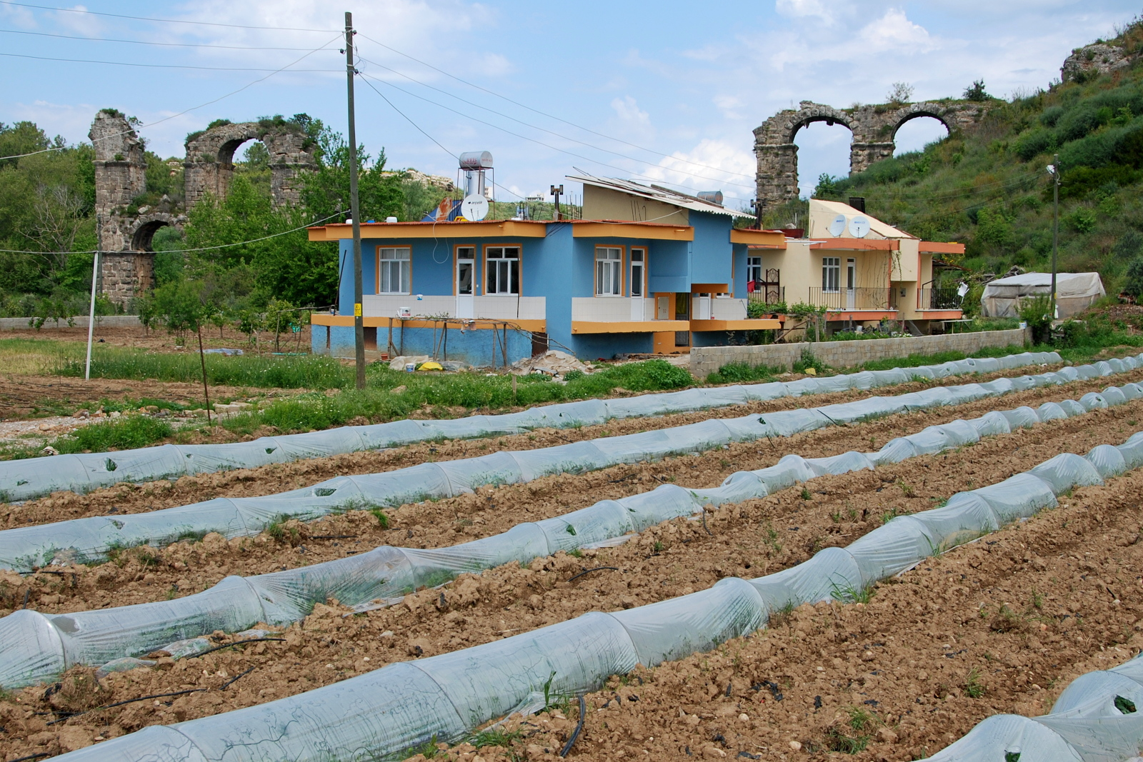 Doppestöckier Abschnitt der Manvgat-Wasserleitung